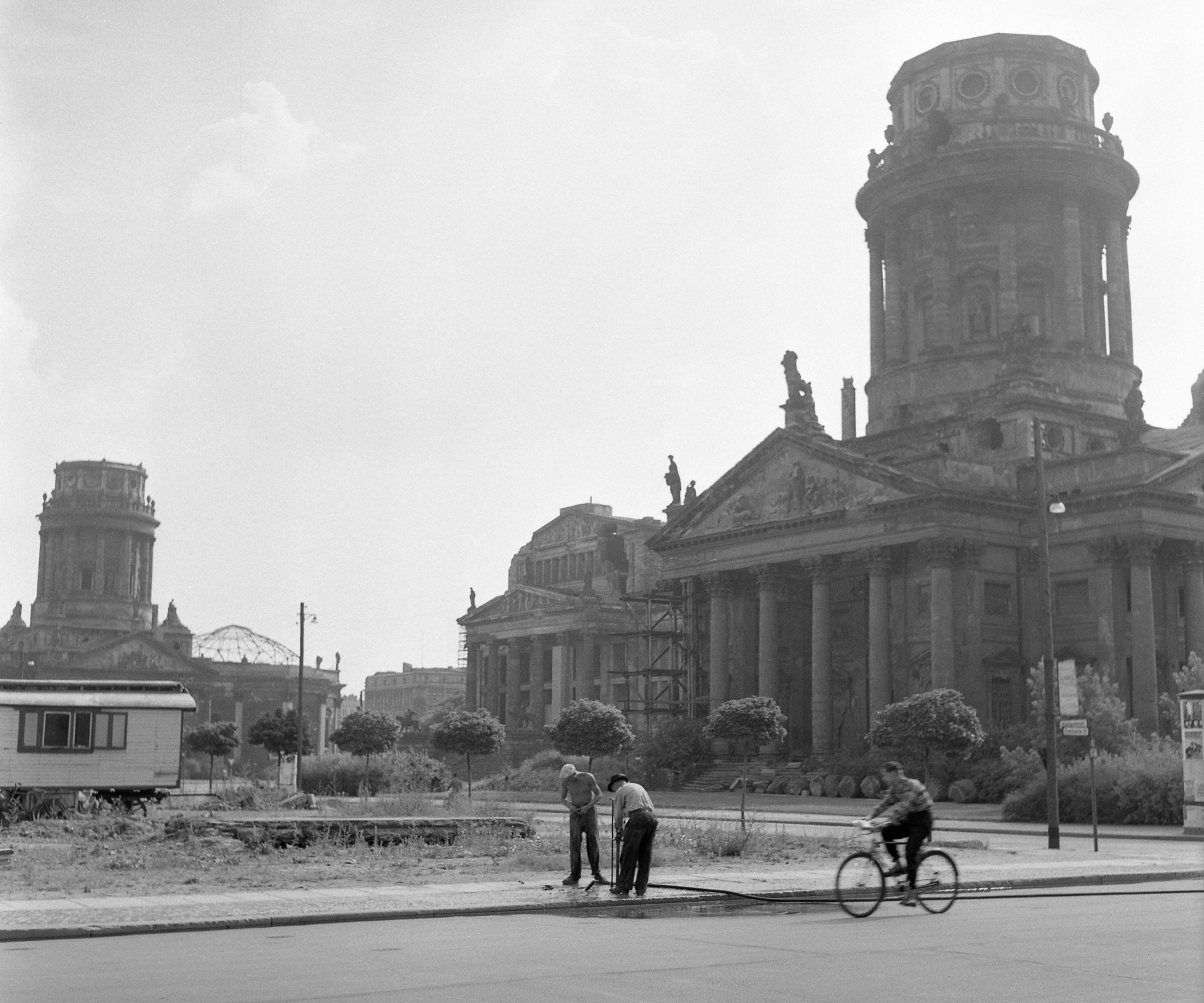 Blick über den Berliner Gendarmenmarkt mit den beiden Domen und dem Schauspielhaus.